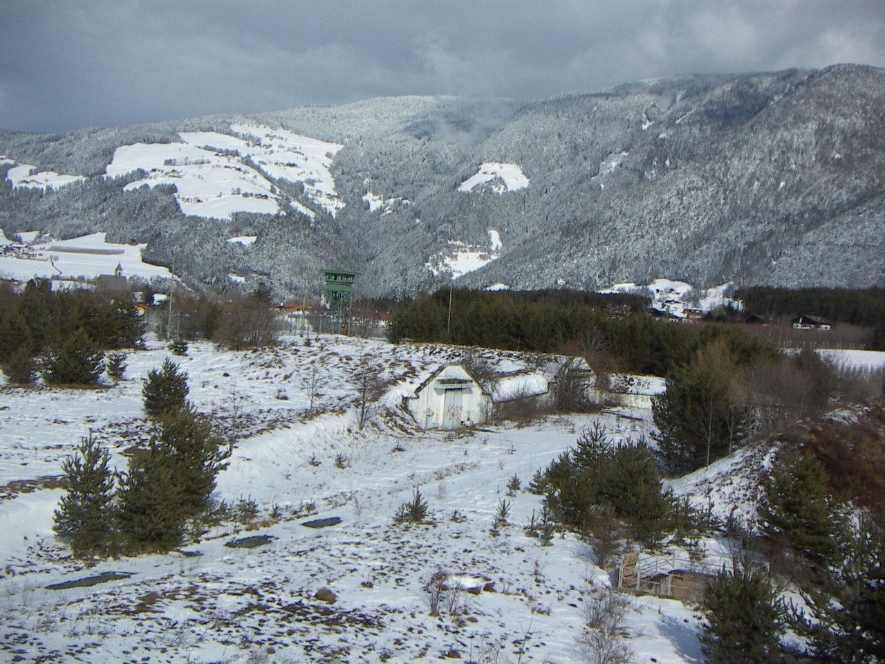 Site Rigel, panorama base "americana"